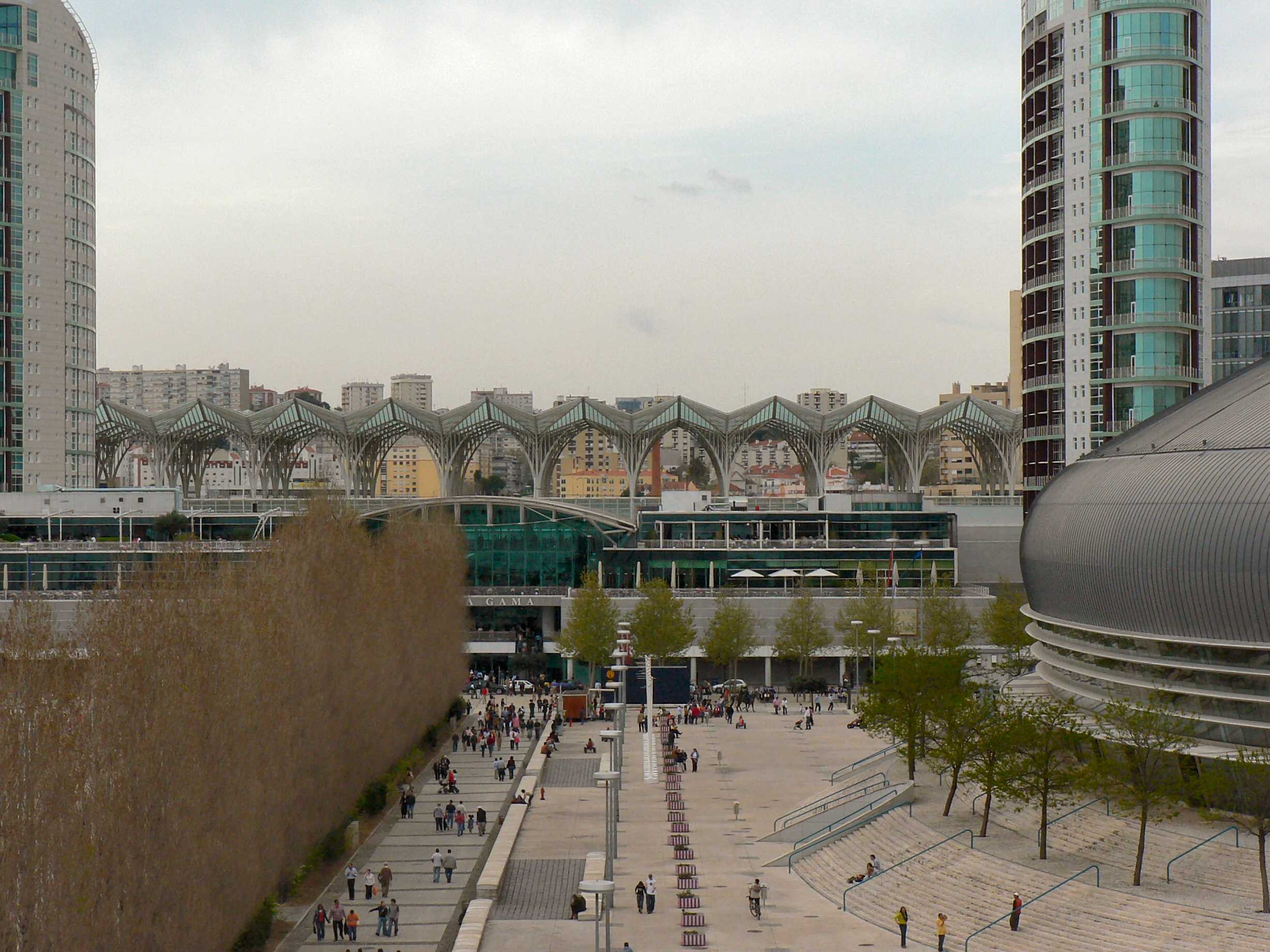 Parque das Nações em Lisboa (Vista do teleférico)